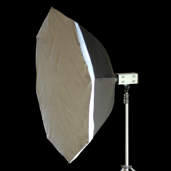 Achteckige Softbox (Octabox)